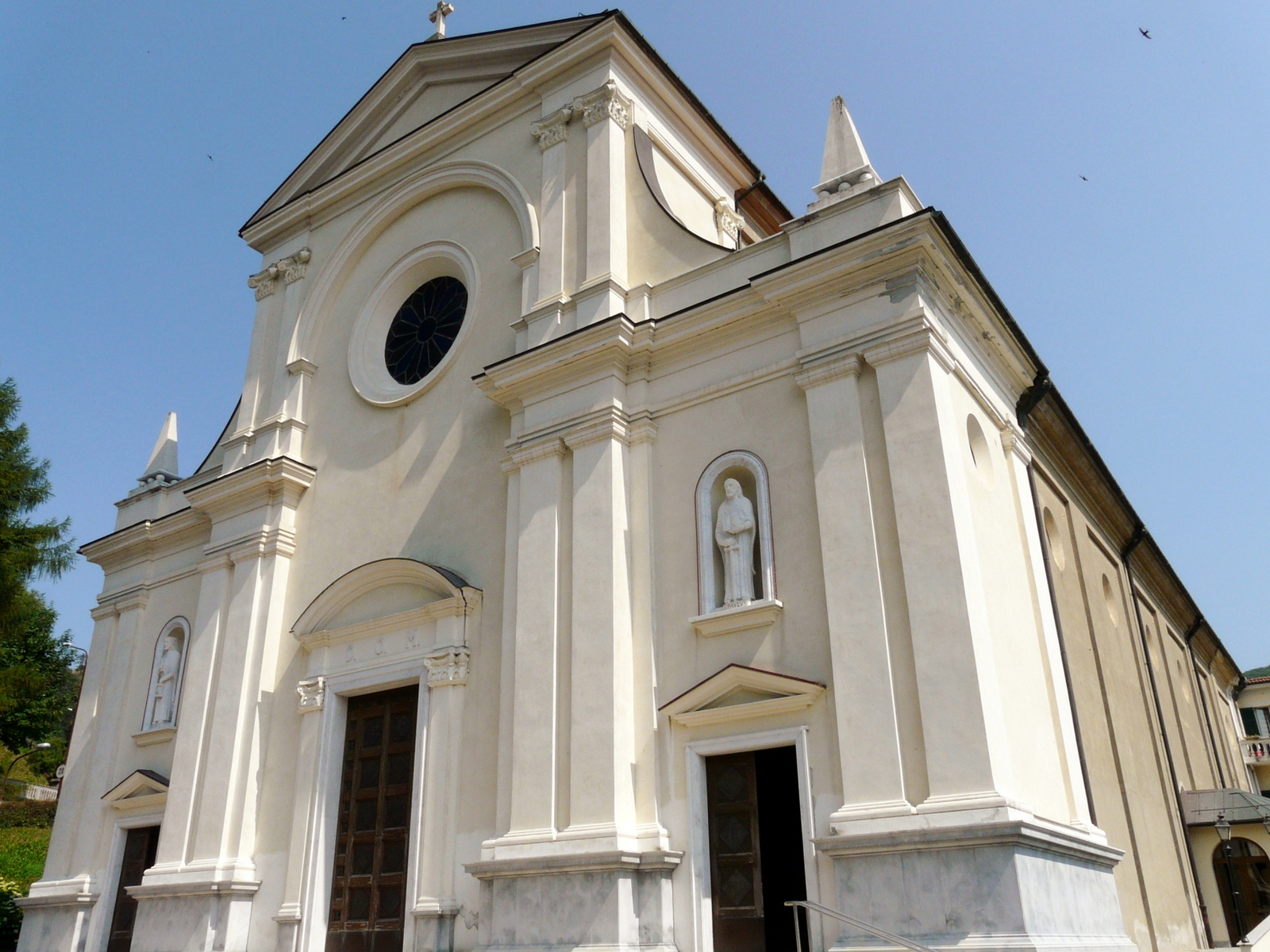 Chiesa di Cristo Re, Masone, Liguria, Italia